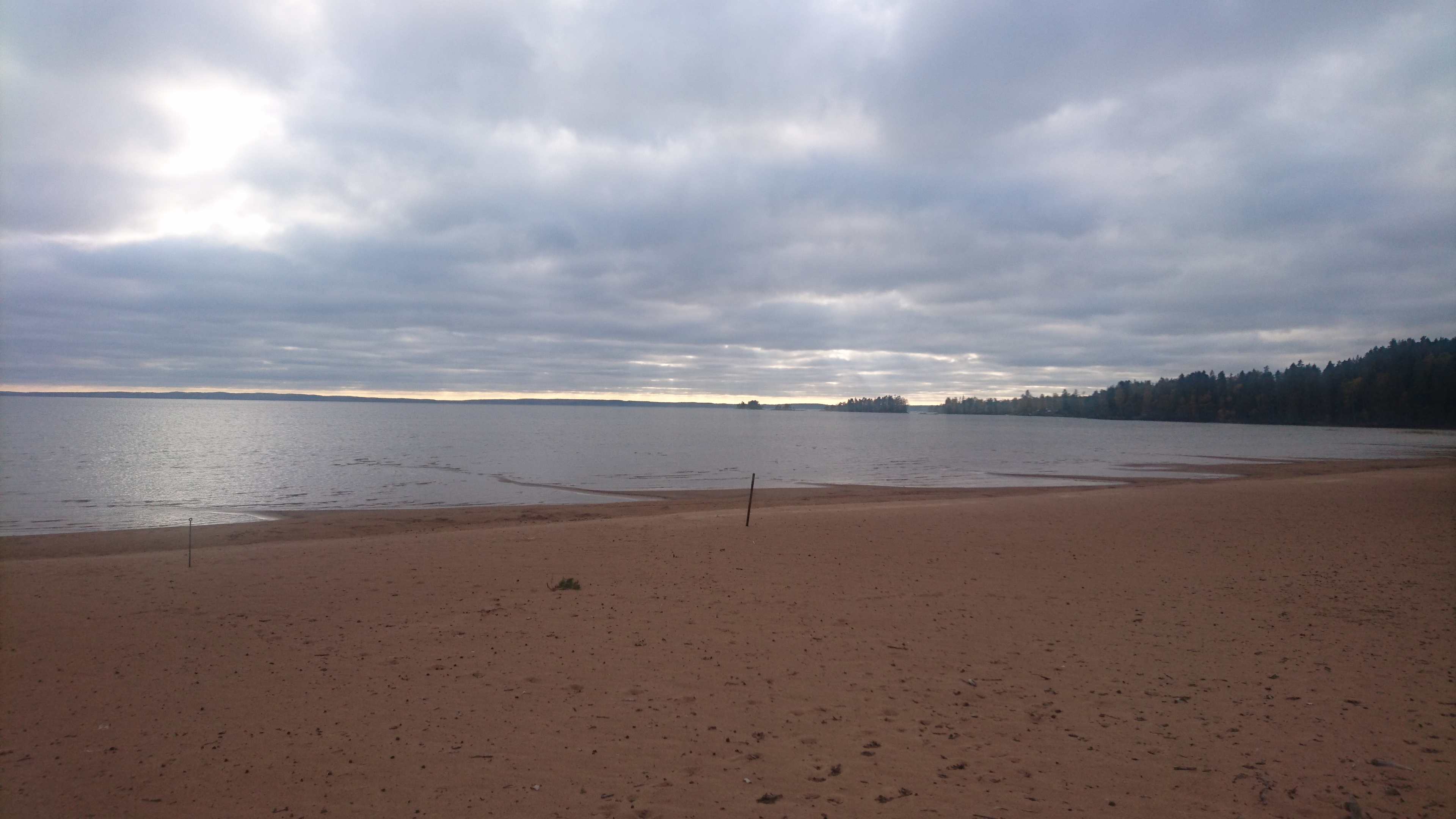 Sjön Unden på hösten tagen vid Tivedsbadet.